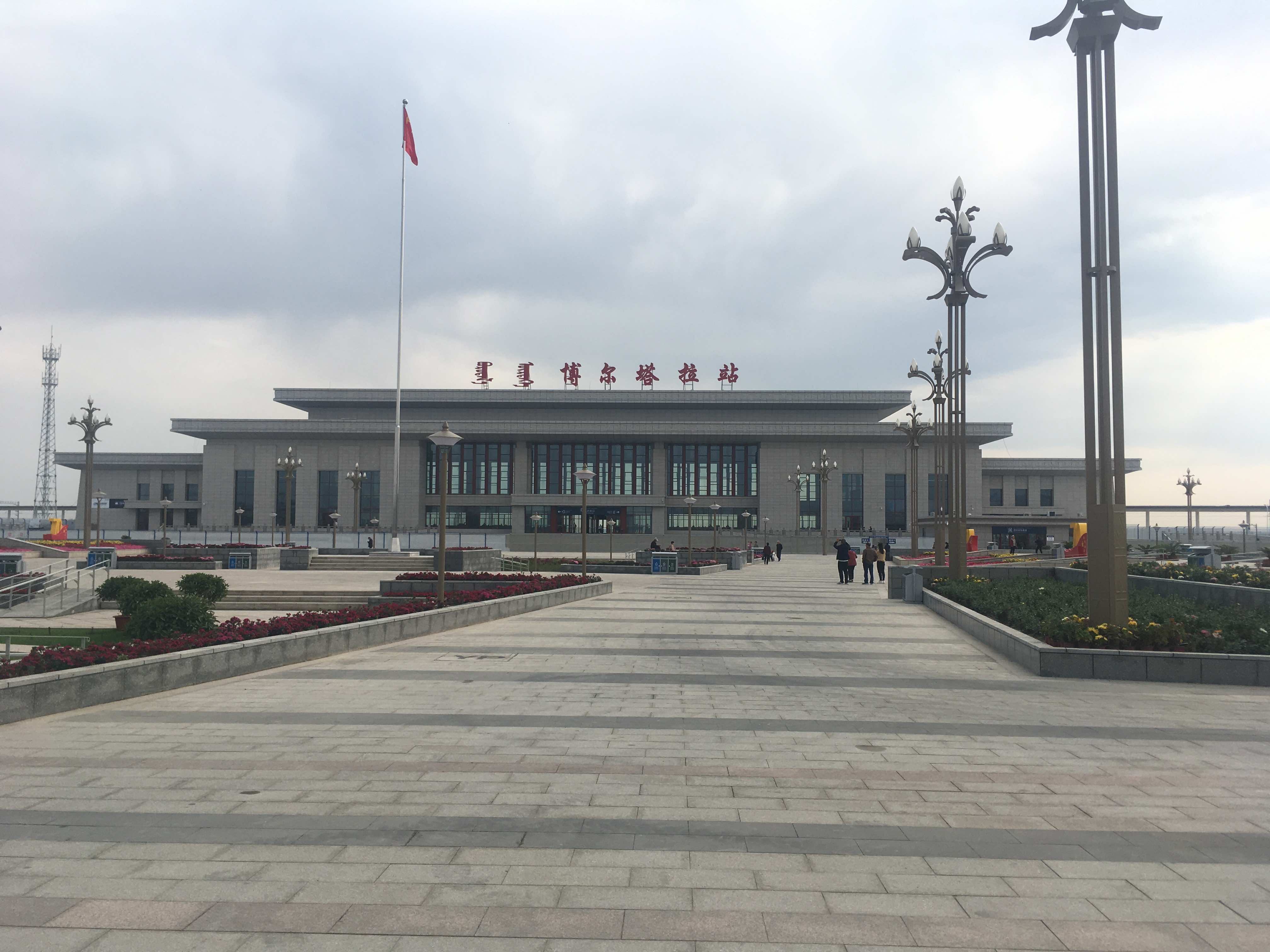 博尔塔拉站的站前广场，拍摄于2019年9月底